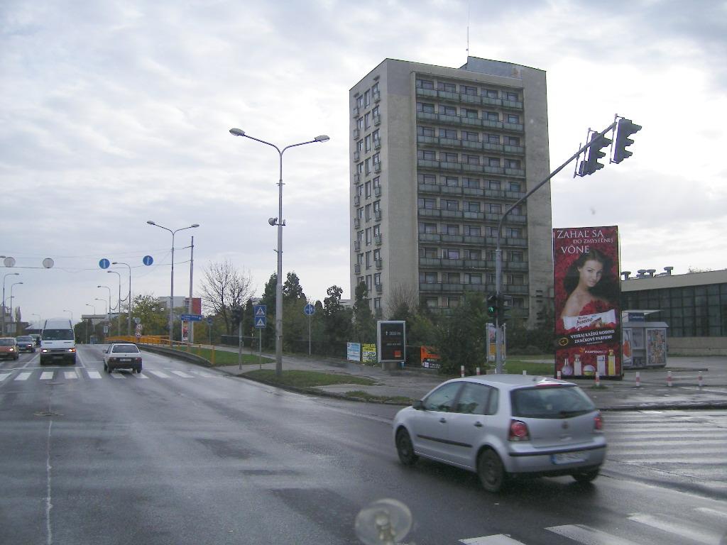 Nitra - trieda Andreja Hlinku (cesta 65)